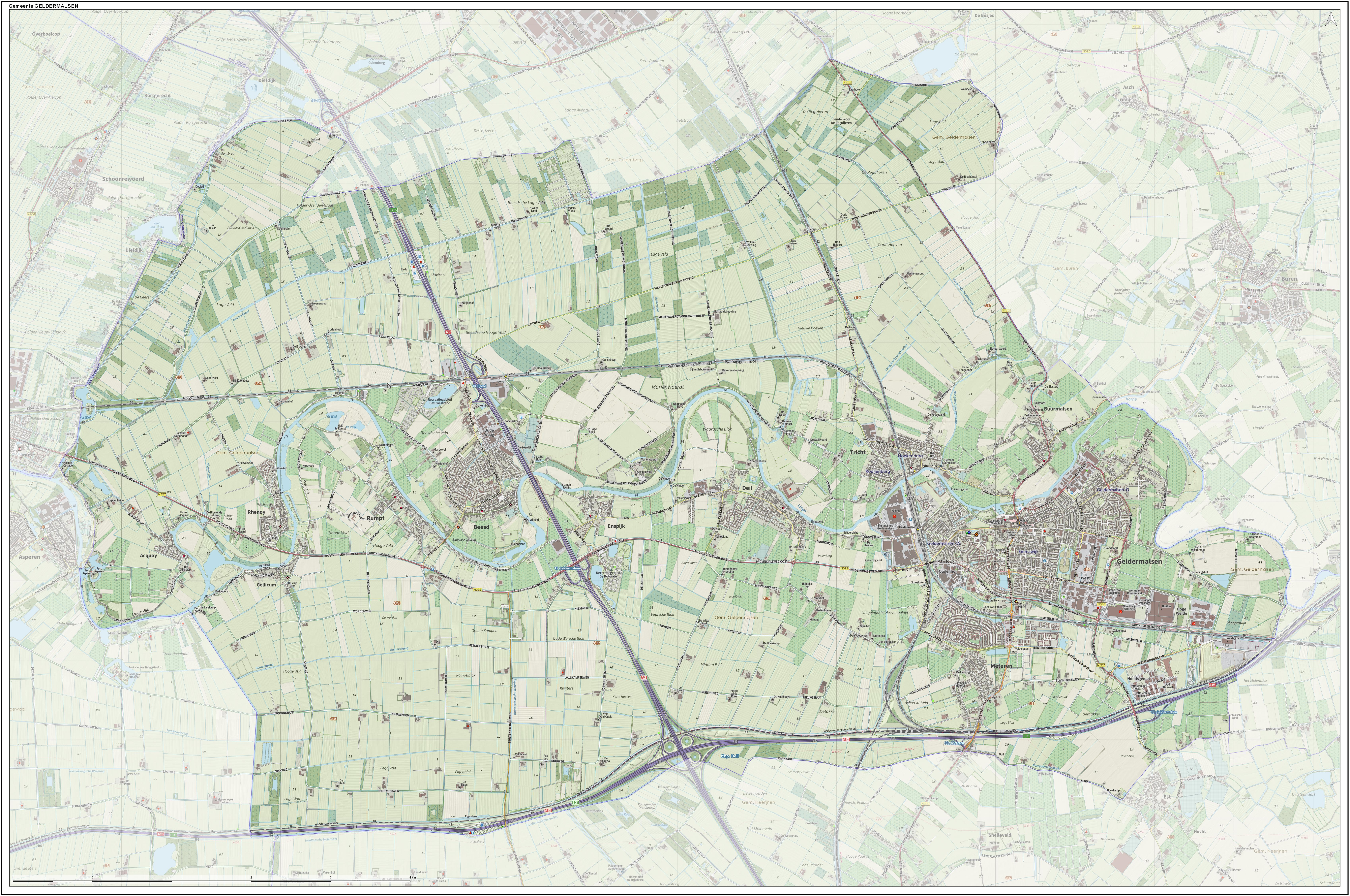 Topografische gemeentekaart. Resolutie: 400 pixels/km. Kaartbeeld samengesteld uit de open geodata van de Top10NL en Top25namen (Kadaster), Creative Commons-BY licentie. Gebouwvlakken uit open geodata BAG extract. Wegen uit de OpenStreetMap, OpenStreetMap community. Reliëfschaduw uit de Actuele Hoogtekaart AHN2. Samenstelling en kleurenschema: Jan-Willem van Aalst, met QGIS. Zie ook de Legenda.